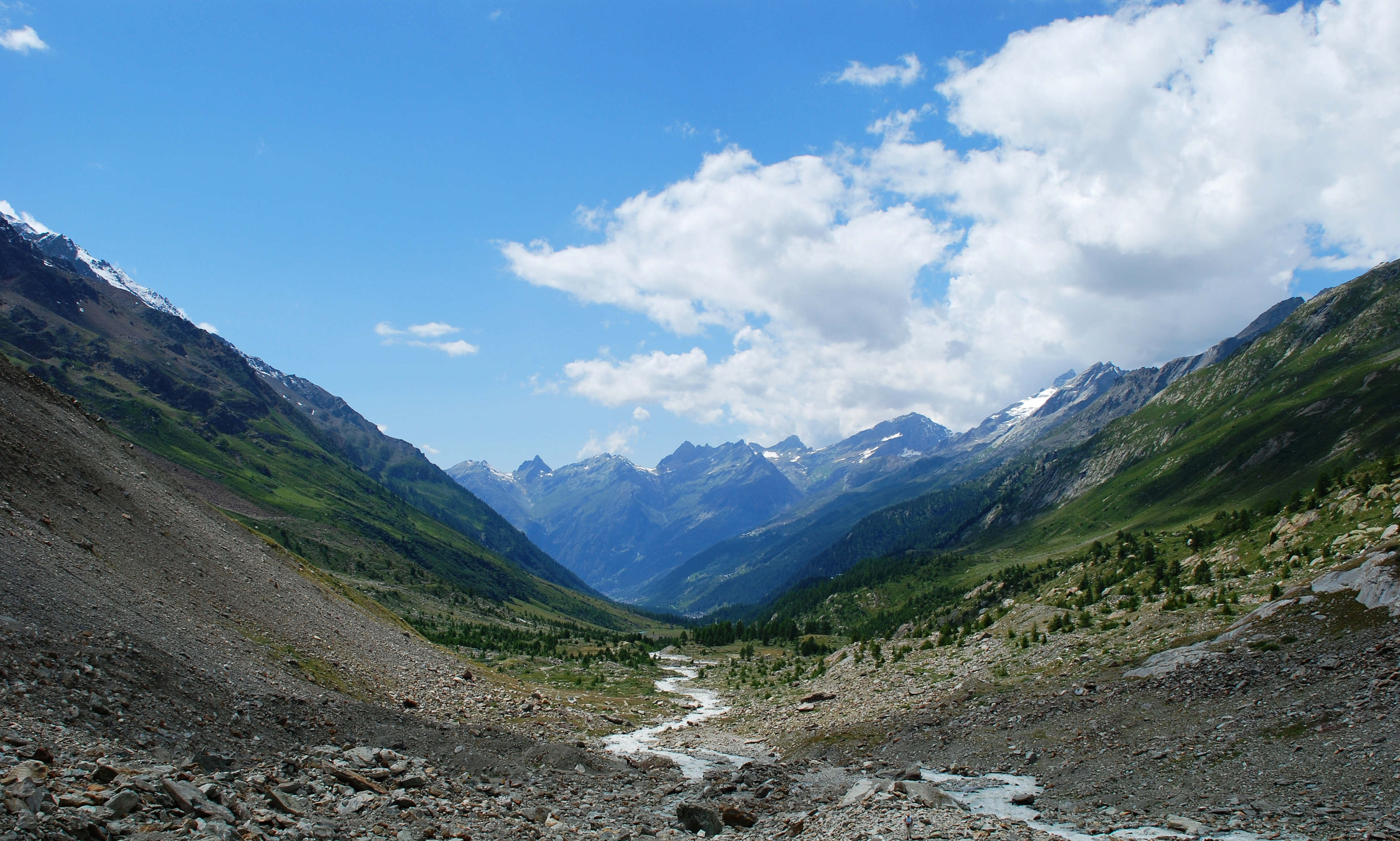 en.: Lötschental, Switzerland; dt.: Lötschental, Schweiz